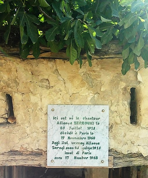 maison de naissance du ténor